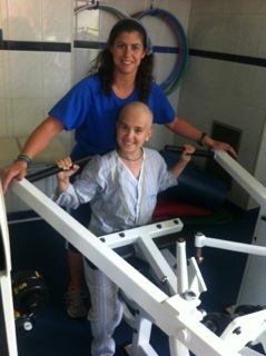 Laboratorio Fisiologia del Deporte